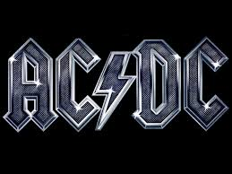 AC/DC los mejores